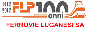 Logo Ferrovia Lugano–Ponte Tresa